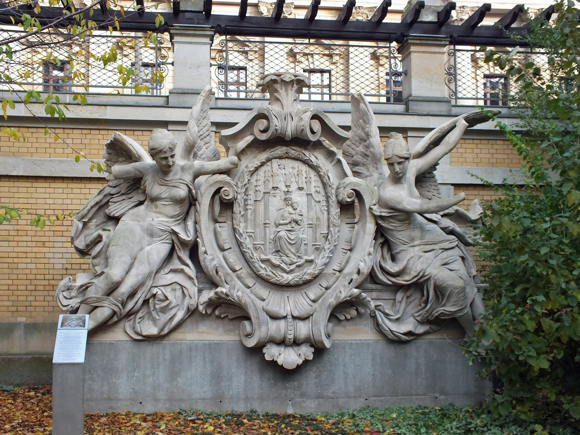 Original der Attikagruppe von der Universitätsbiblithek Leipzig von Joseph Kaffsack, 2010 aufgestellt im Hof der Bibliothek